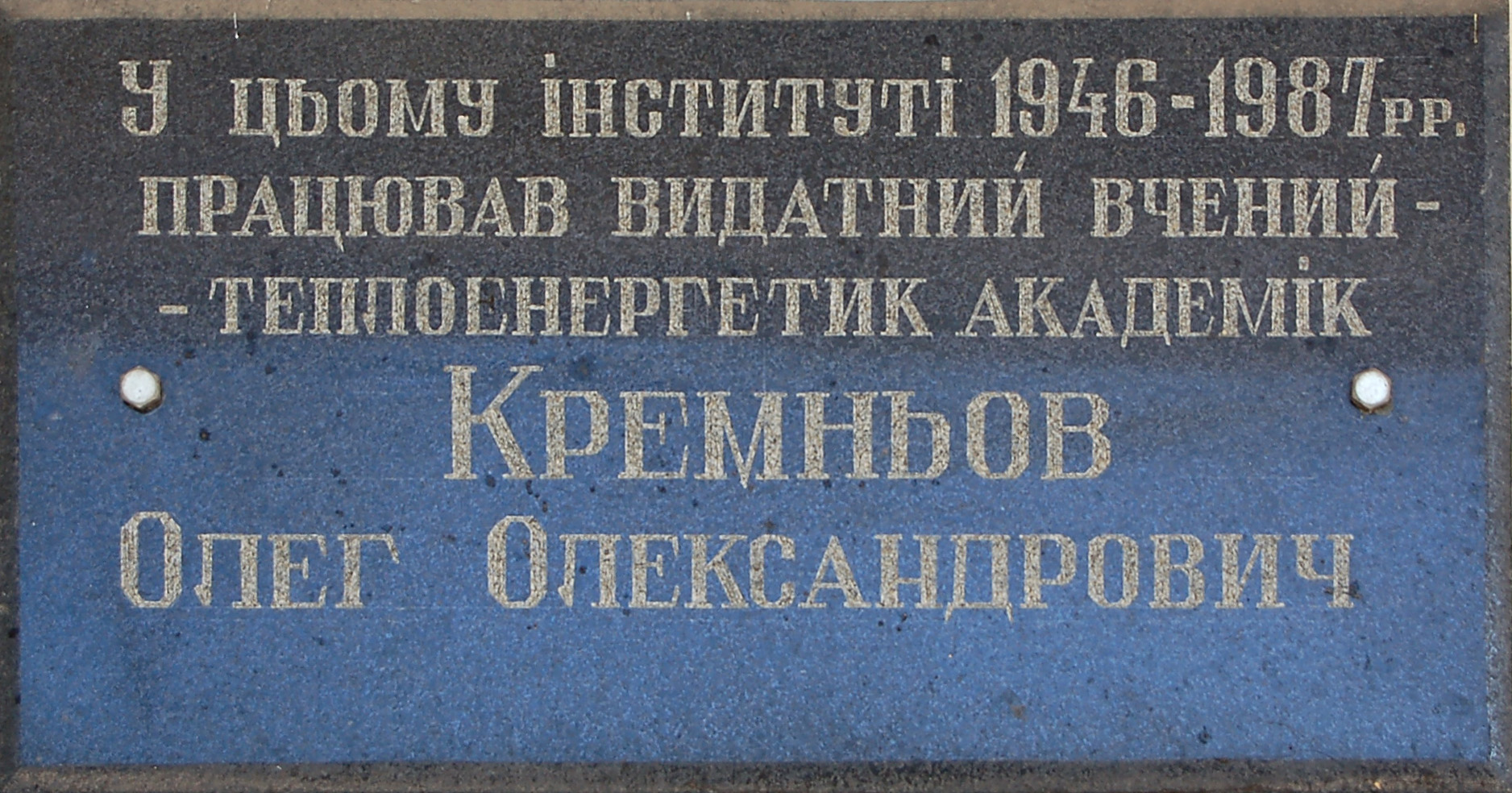 Меморіальна дошка академіку НАН України О. О. Кремньову на будівлі Інституту технічної теплофізики НАН України, де він працював у 1946—1987 роках (Київ, вулиця Академіка Булаховського, 2)